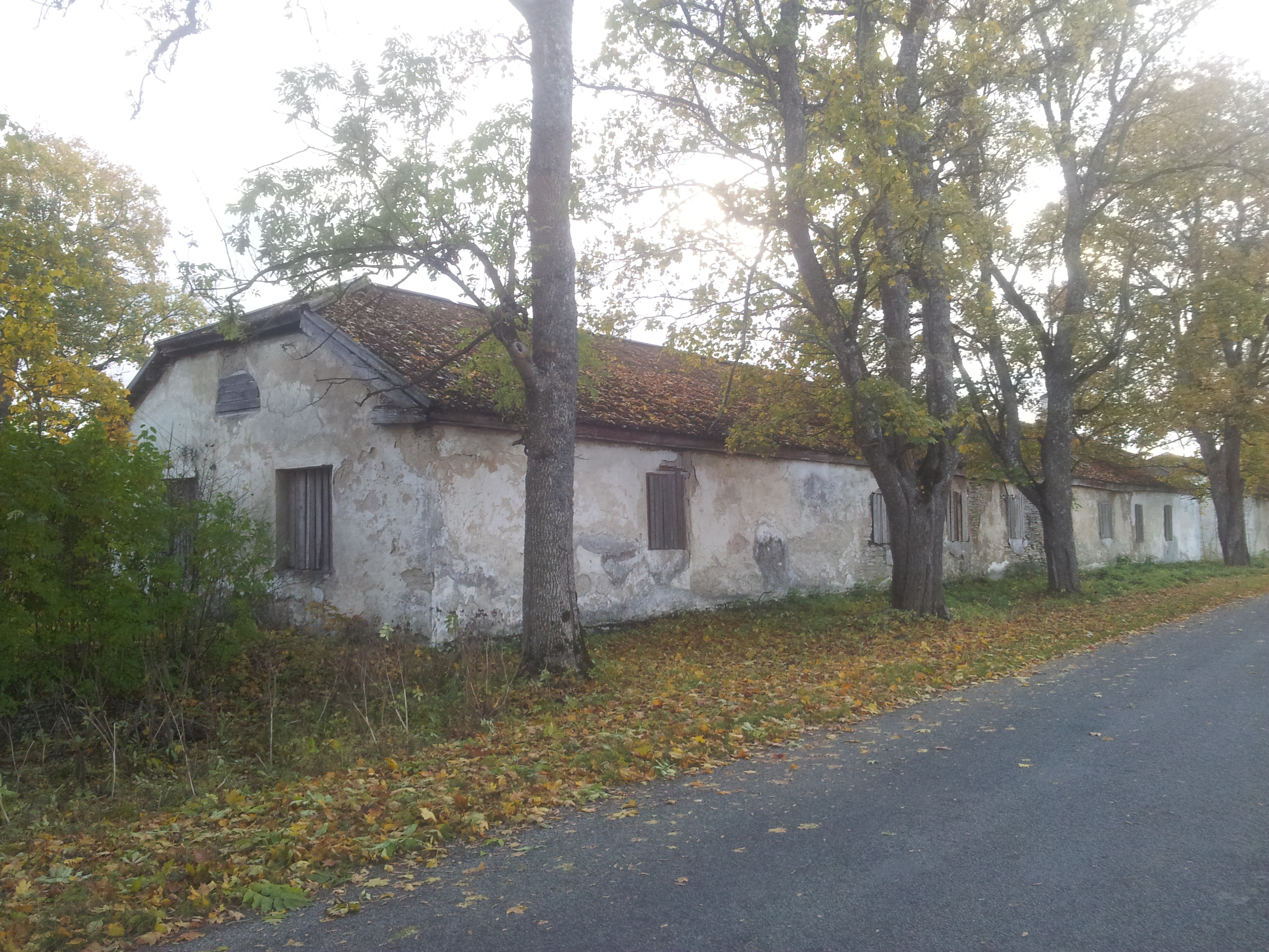 Aaspere mõisa sõiduhobuste tall